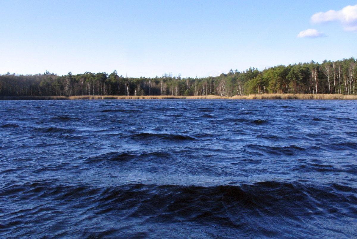 Hladina Kamenného rybníka a jeho západní břeh s přírodní rezervací na severním okraji Plzně. Autor: Adam Hauner Datum: 18. 1. 2007